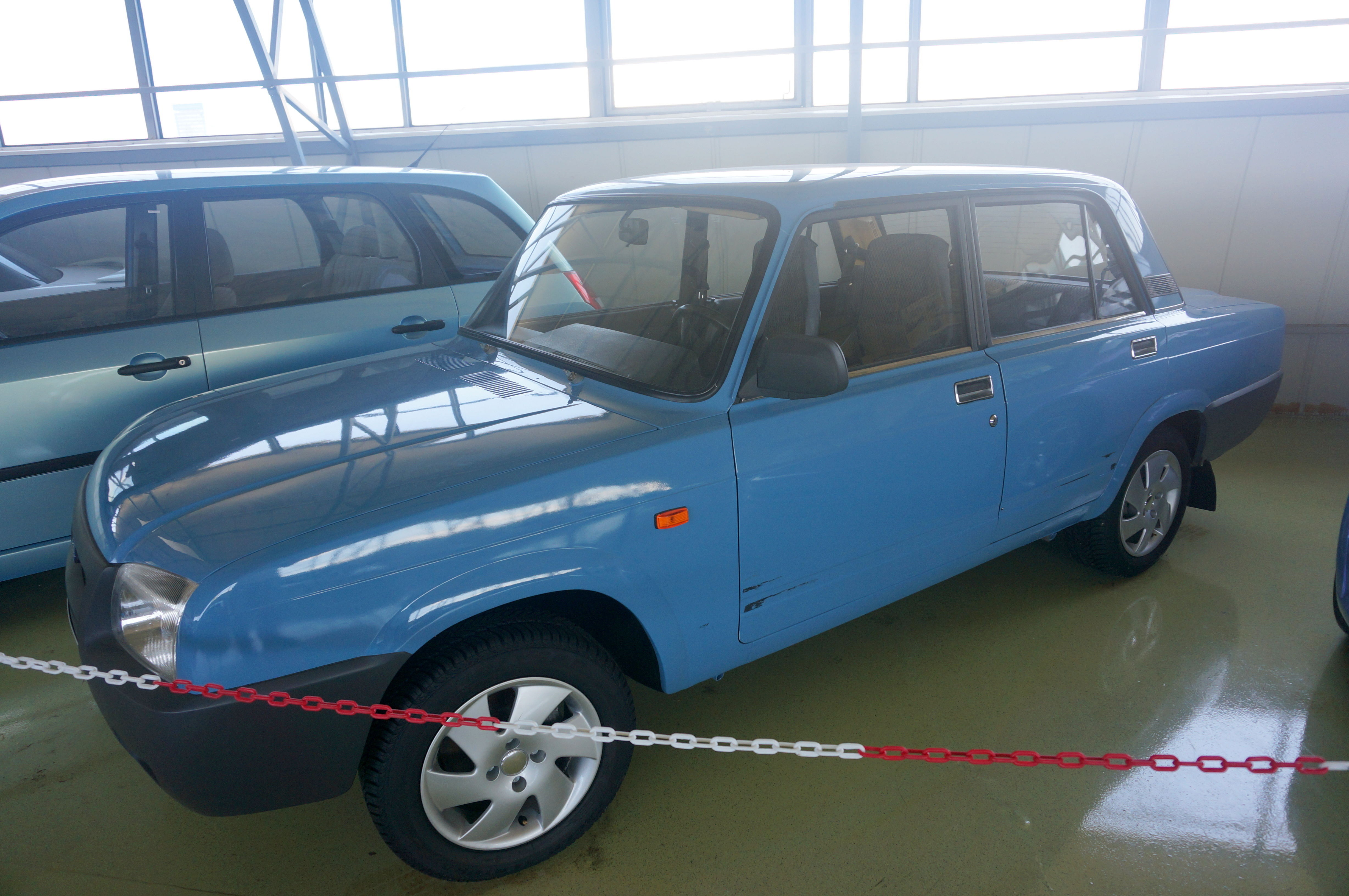 ВАЗ 2107М, модель, предполагавшаяся в качестве замены на конвейере для ВАЗ-2107